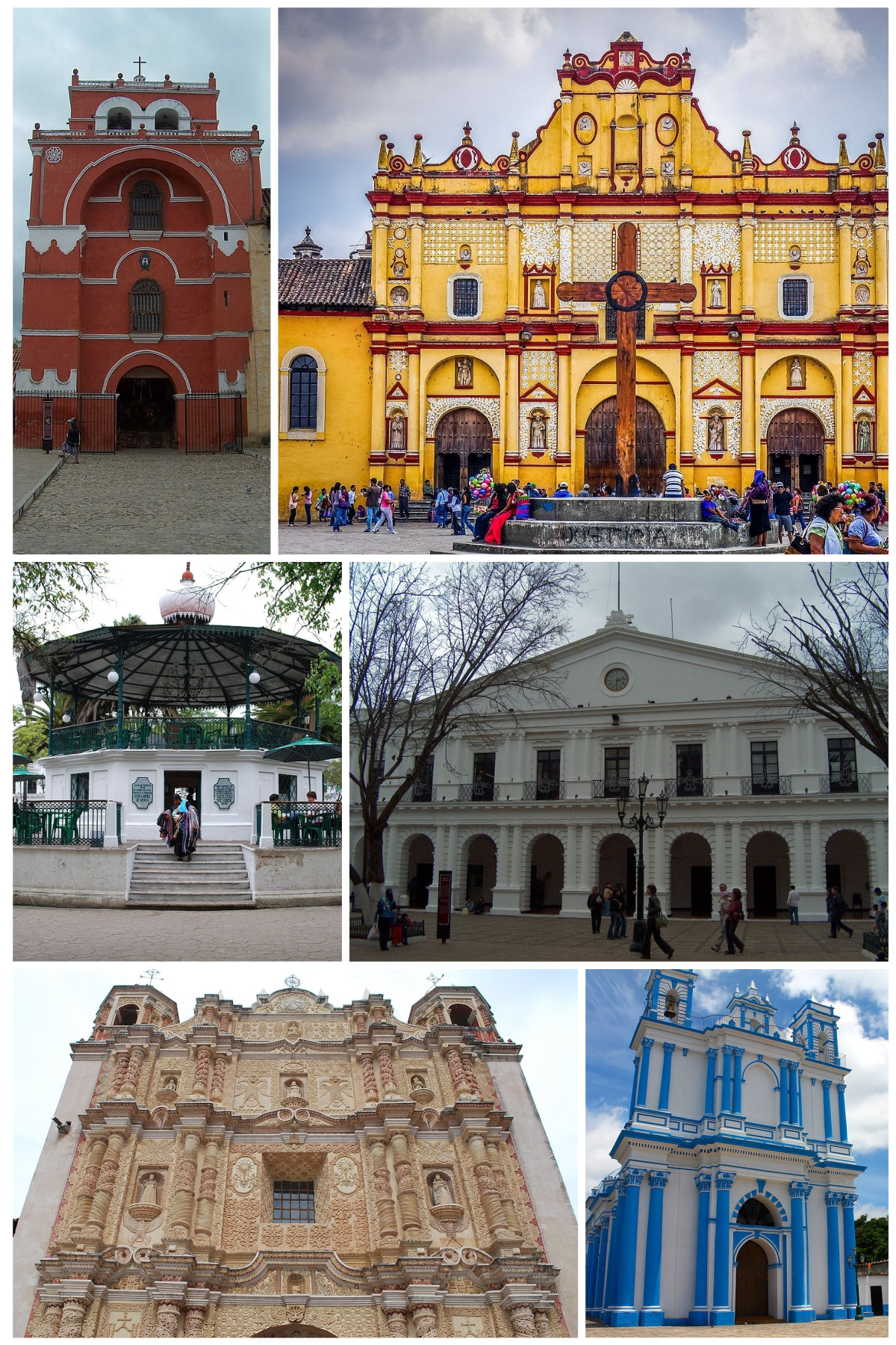 San Cristóbal de Las Casas